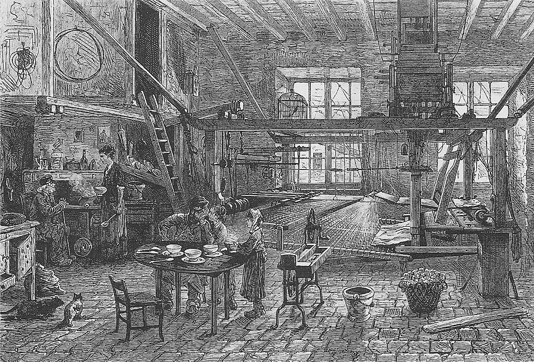 La crise lyonnaise. Intérieur d'un tisseur en soie. D'après nature.